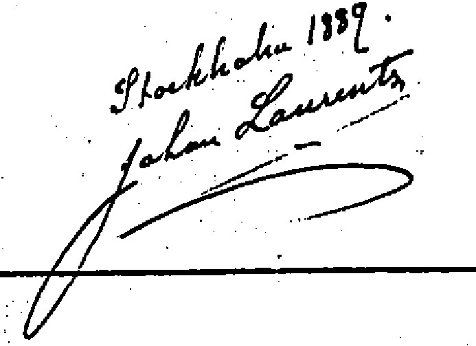 Lars Johan Laurentz nanmnteckning